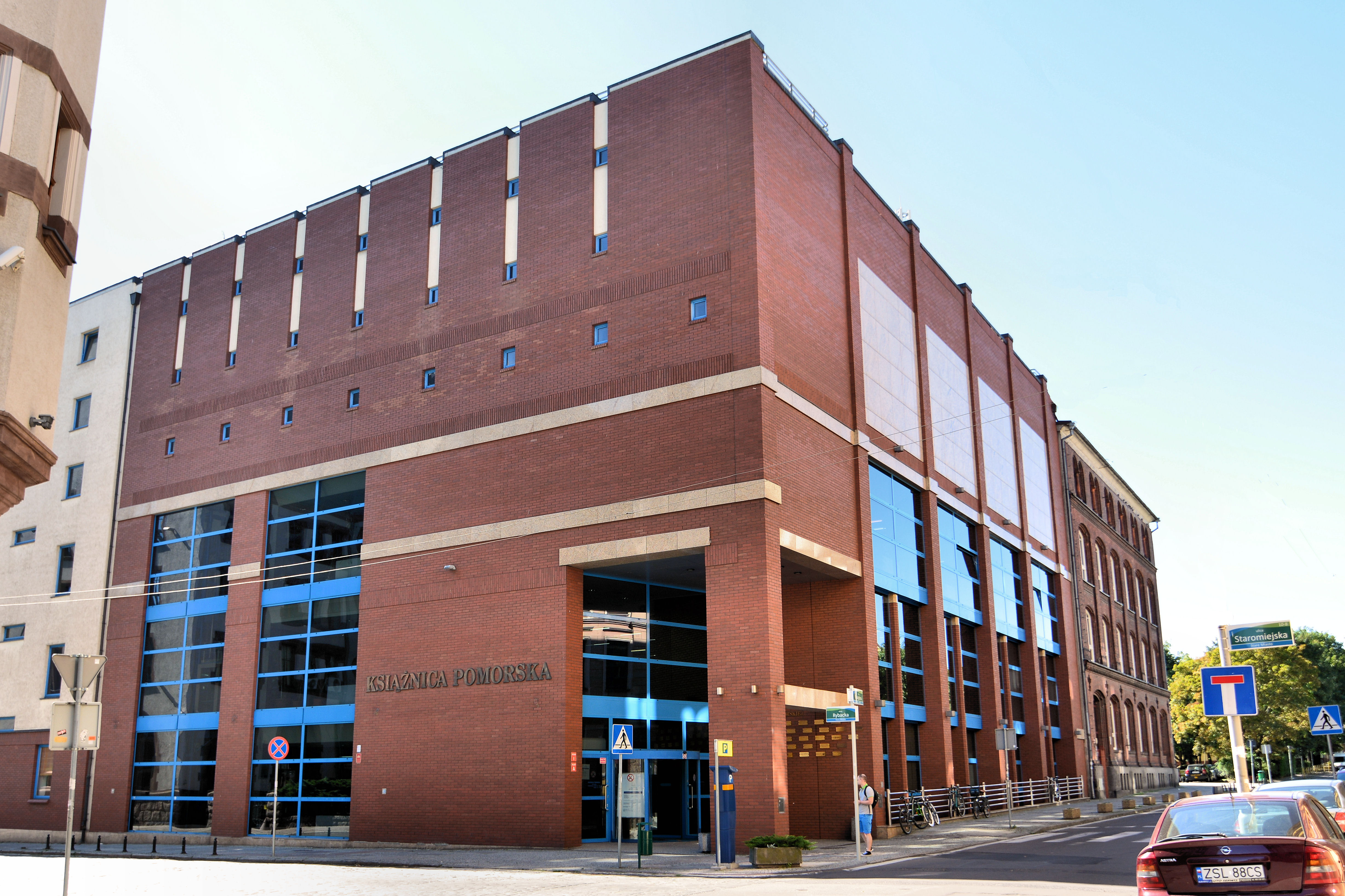 Nowy gmach Książnicy Pomorskiej w Szczecinie